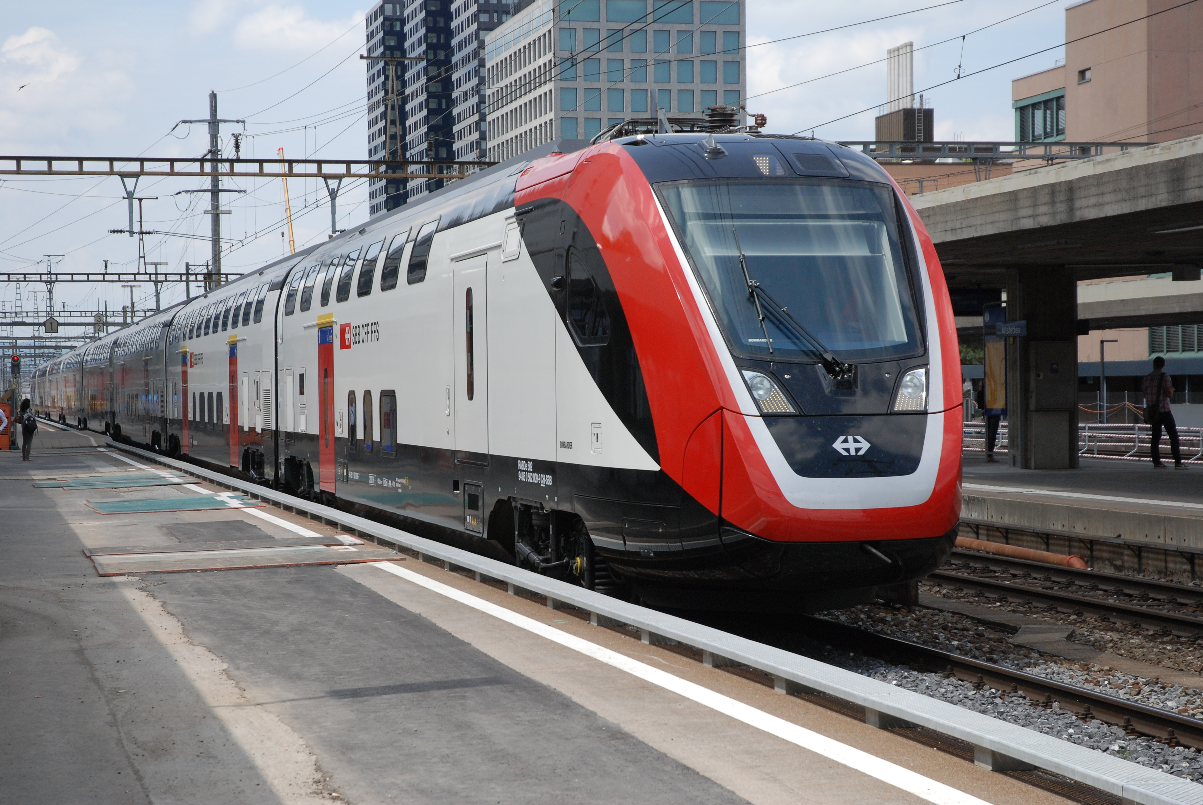 SBB RABDe 502 009 „FV-Dosto“ in Zürich Altstetten